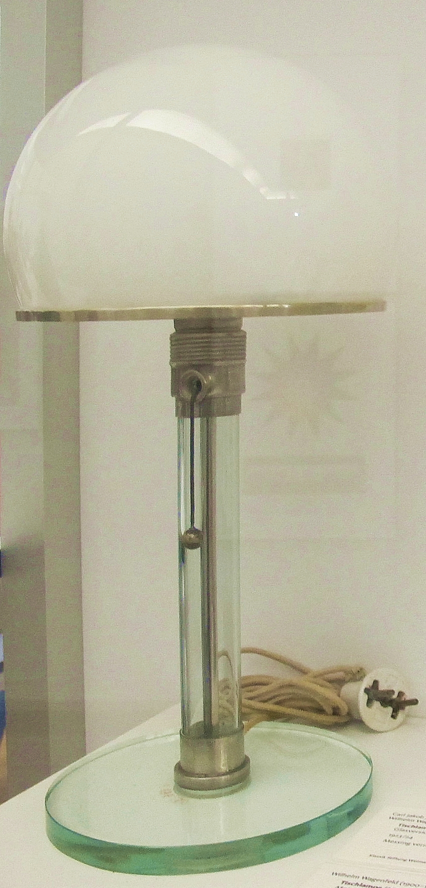 Tischlampe di Carl Jakob Jucker (left, 1923-24) e di Wilhelm Wagenfeld (right, 1924) (cropped)